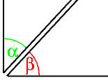 Ángulos complementarios Dibujo original de Larocka